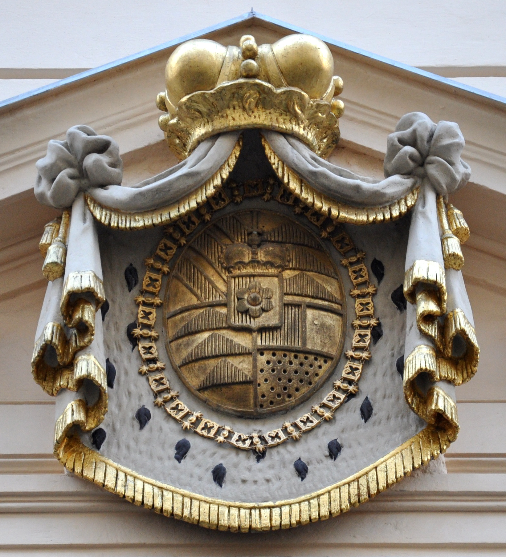 Wien, Herrengasse 21 (Palais Trauttmansdorff), Wappen Trauttmansdorff; wahrscheinlich von Ferdinand von Trauttmansdorff (1749 - 1827; seit 1789 Ritter des Ordens vom Goldenen Vlies)